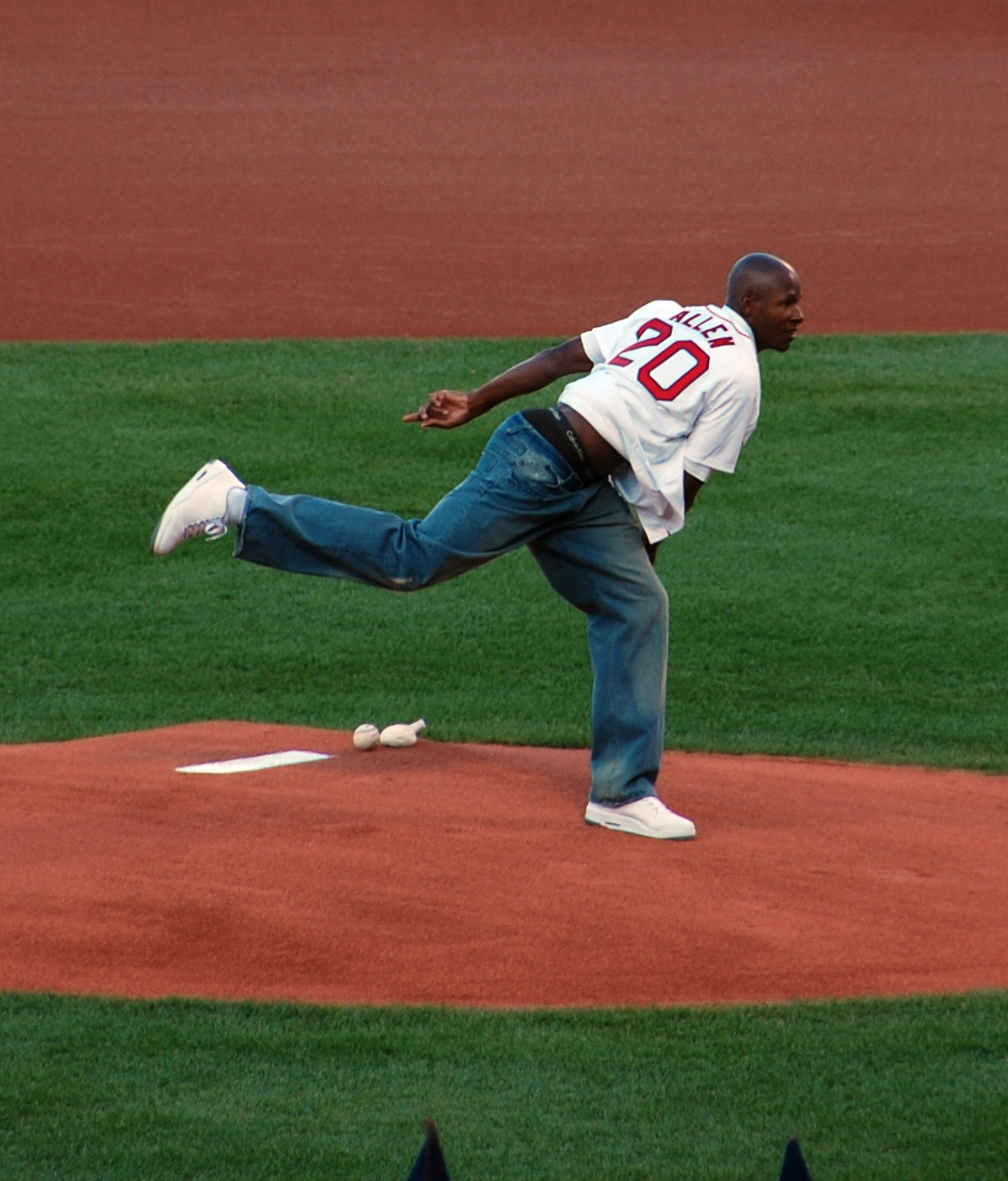 Walter Ray Allen delivers